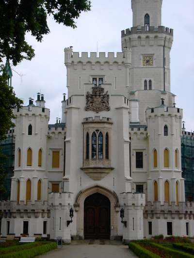 Jagdschloss Hubloka bei Budweis